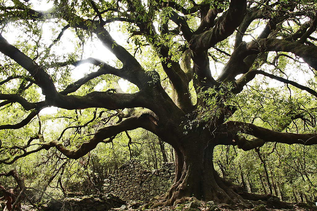 Quercia monumentale